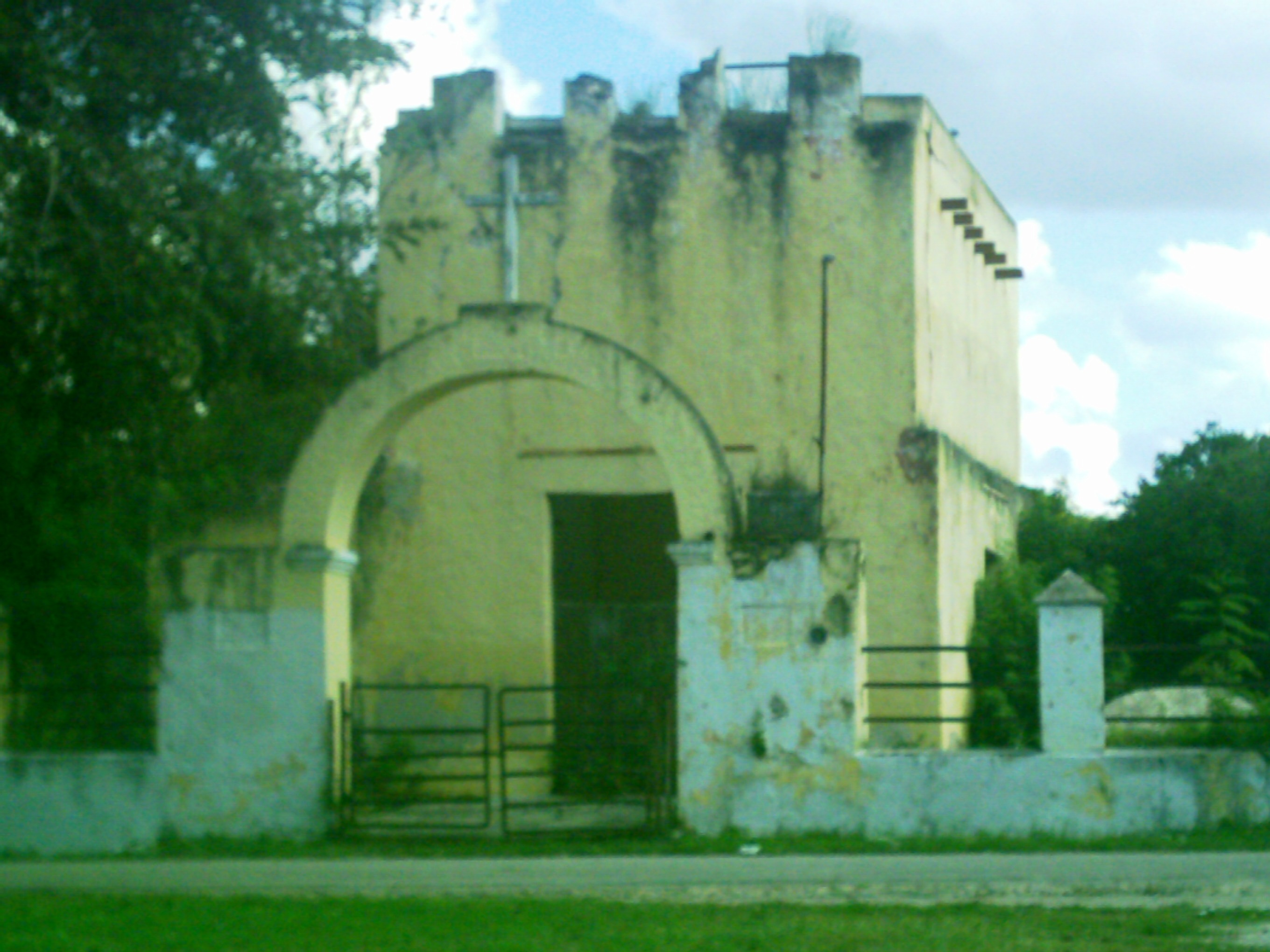 Iglesia de Sac-Nicté (Municipio de Mérida), Yucatán.